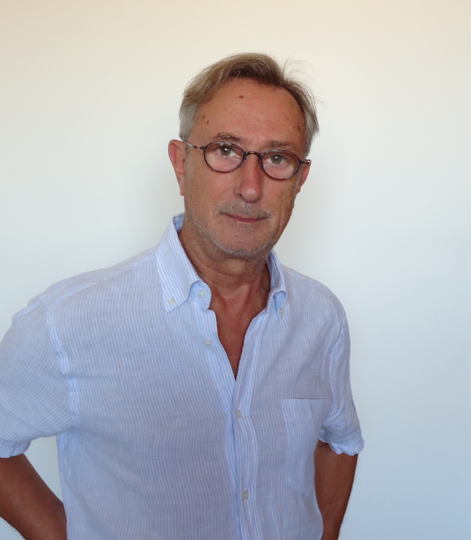 L'attore Giovanni Calò